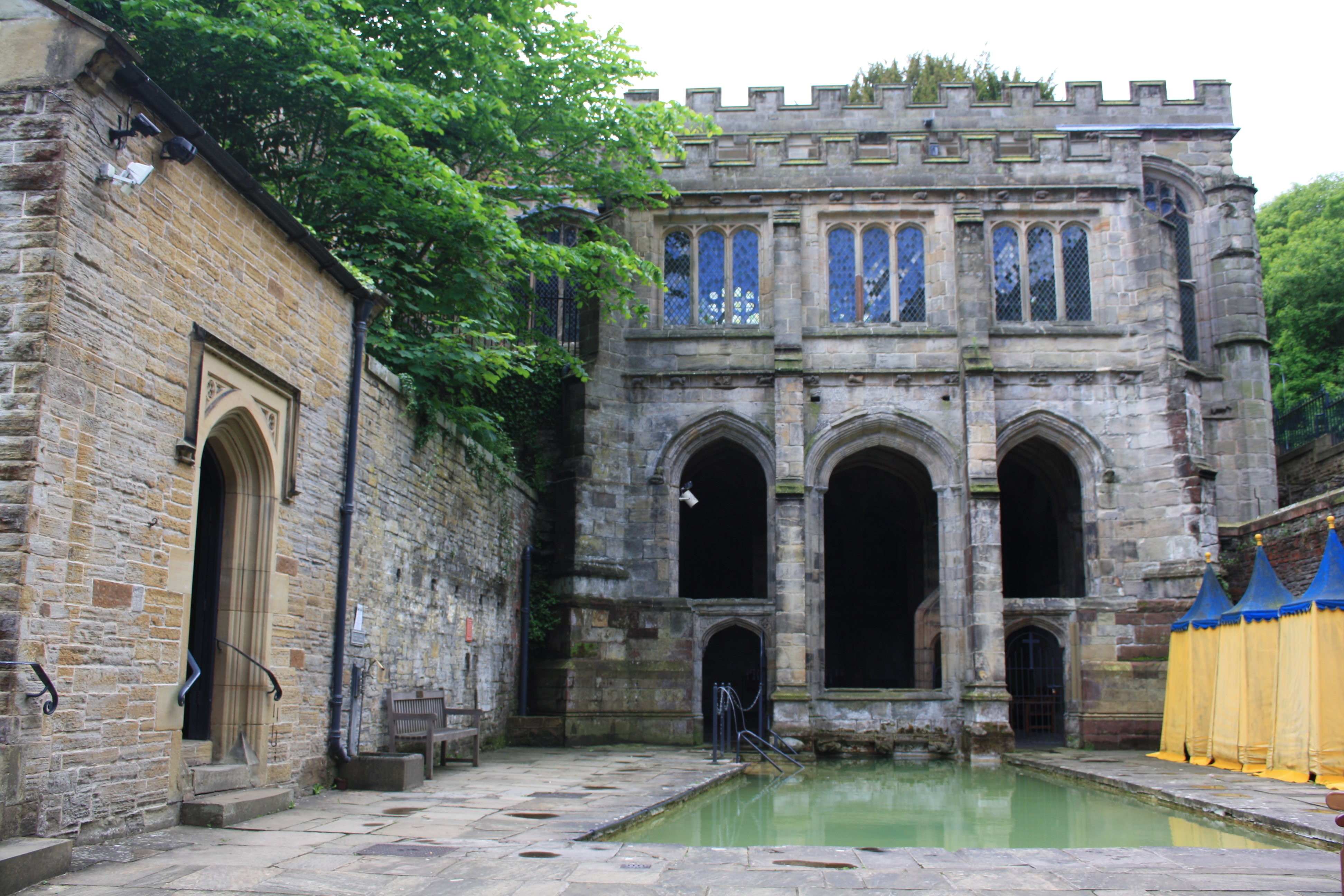 Holywell, St Winefride